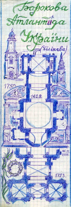 Тематична заставка для українського порталу Бароко